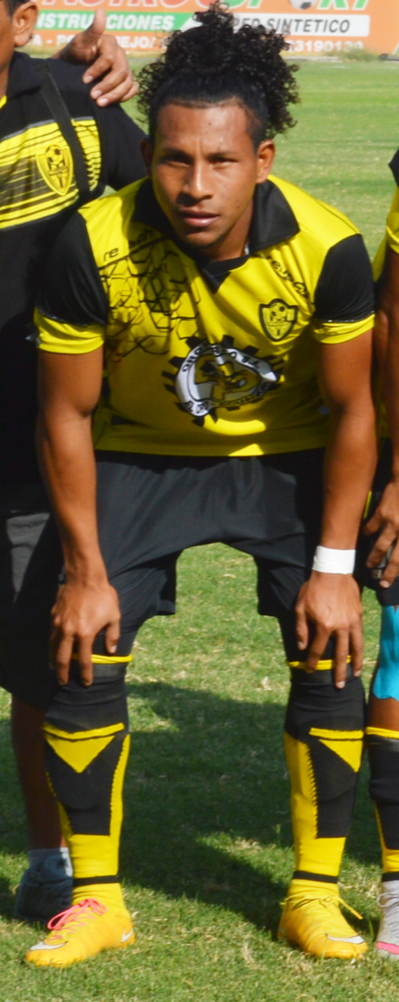 Ángel Gracia en Fuerza Amarilla 2015